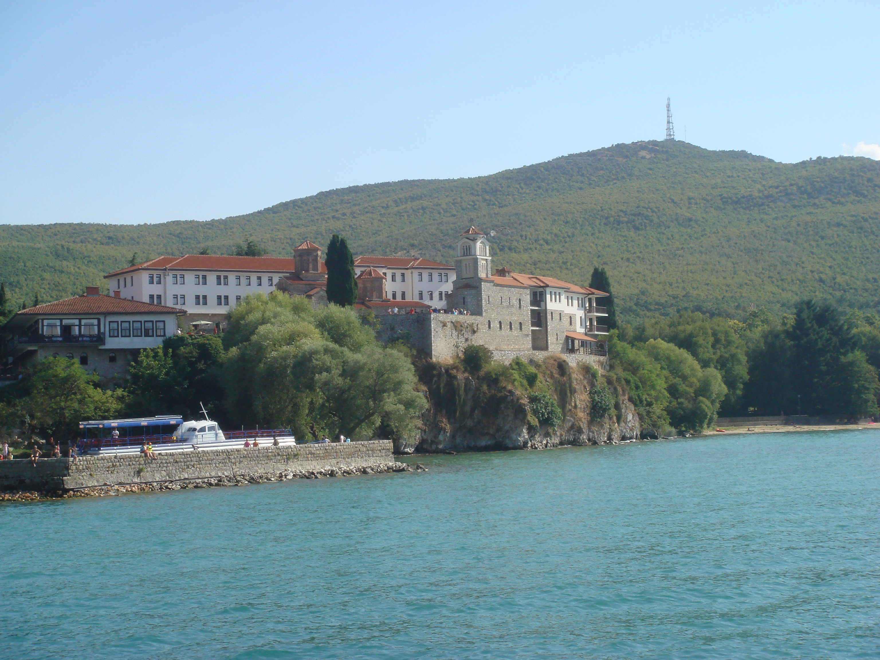 Манастирът „Свети Наум“ в Република Македония, сниман от езерото.